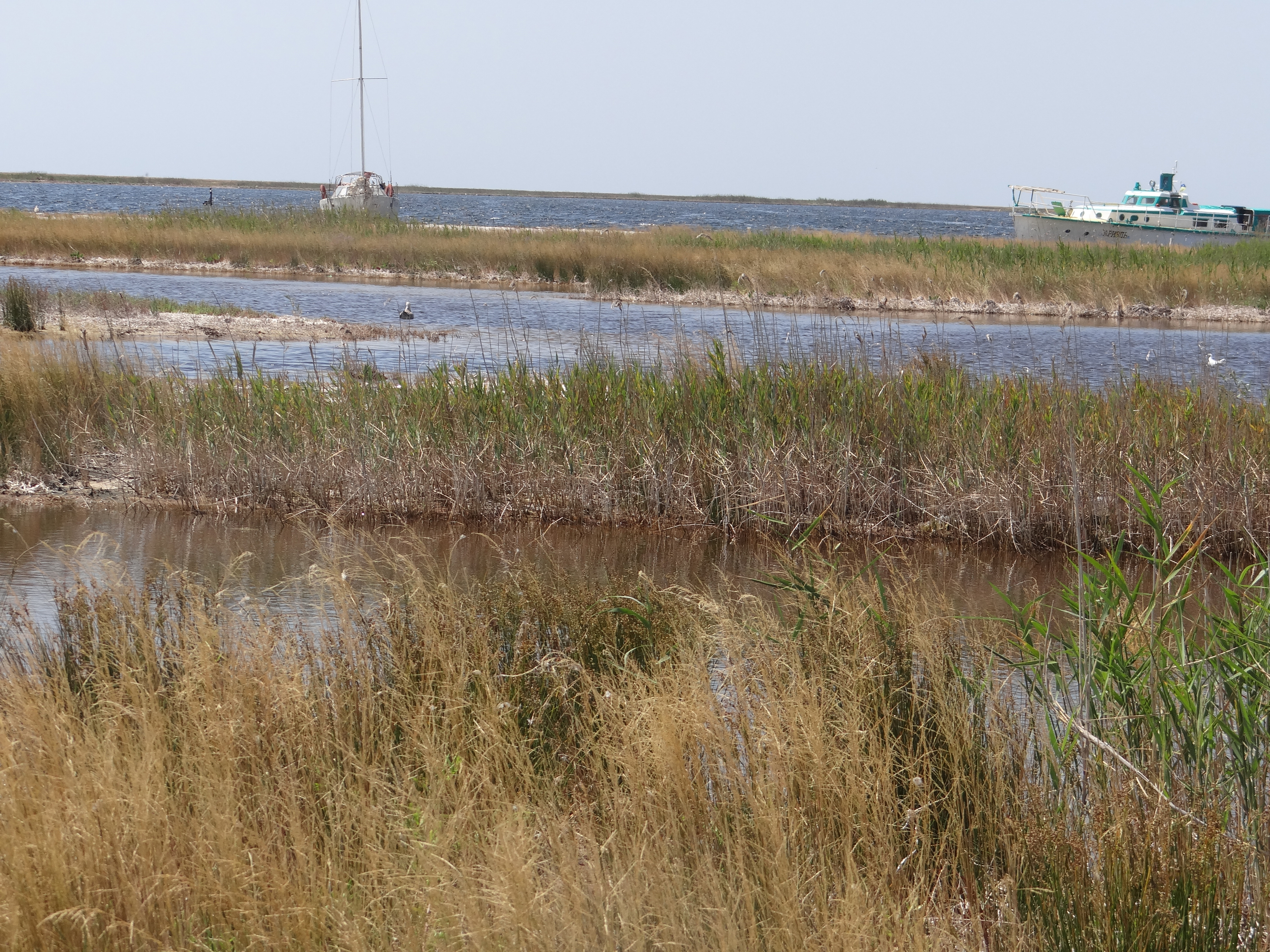 Краєвид